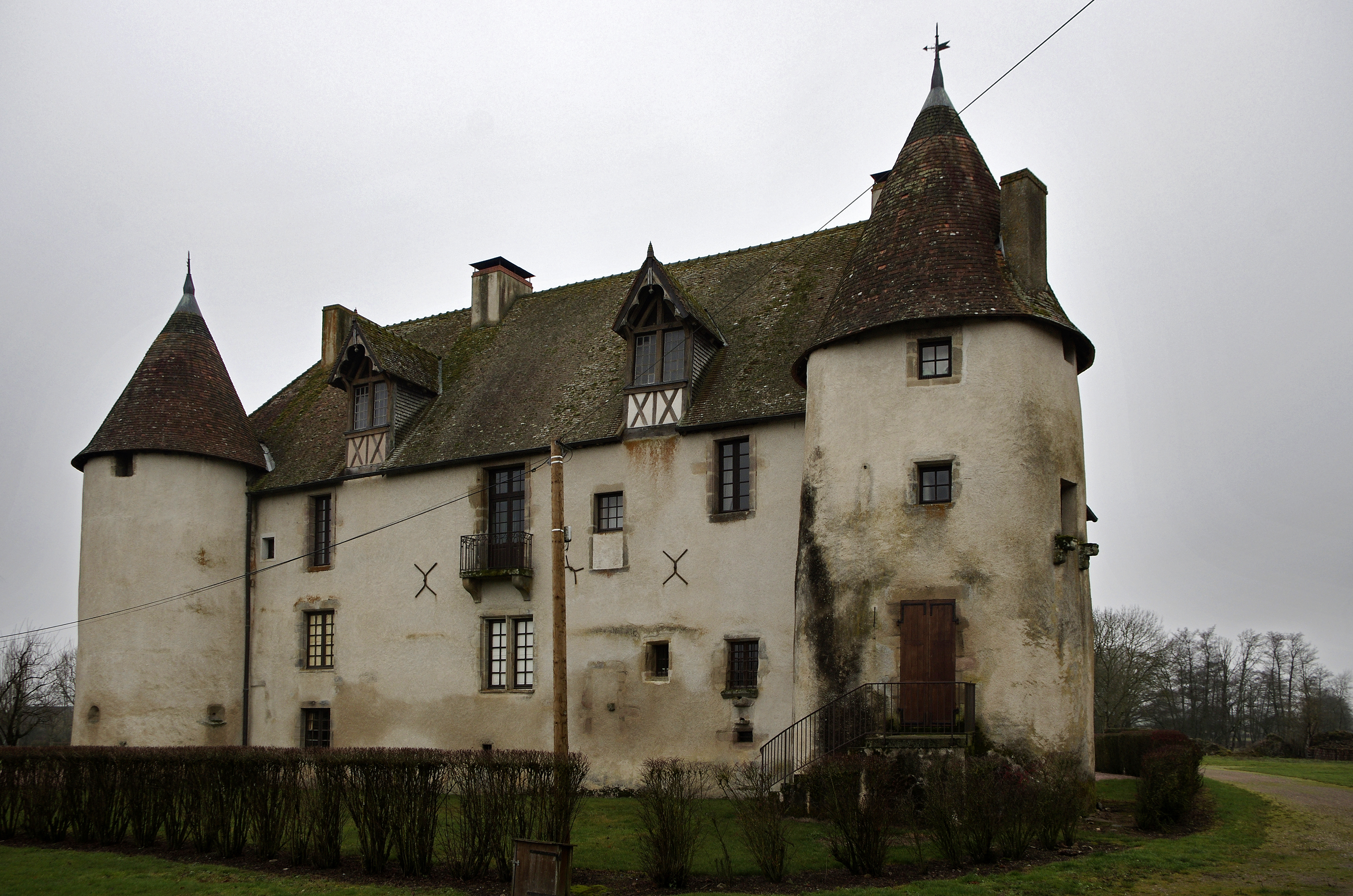 Monthelon (Saône-et-Loire). Le Vieux Château (XIVe -XVe) Le berceau des seigneurs de Monthelon était une motte féodale située au hameau de En Lée. A partir du XIVe-XV- siècle, ceux-ci s'installèrent près de la rivière la Celle, dans une belle maison-forte, à un peu plus d'un kilomètre de la motte féodale d'origine. Cette maison forte, consiste en un logis rectangulaire flanqué de deux tours circulaires. Elle est remarquable par sa galerie à quatre petites colonnes et par le bas relief, au dessus d'une porte, qui représente les armes des Robutin – Chantal entourées du collier de saint Michel tenu par des anges, et accompagnées de la devise de Guy de Rabutin : VIRESCIT VULNERE VIRTUS (la puissance s'accroît avec les blessures). Les portes en bois qui ouvrent sur cette galerie conservent des traces d'un décor Renaissance. La façade principale qui donne sur une vaste cour, a été refaite par Guy de Rabutin-Chantalqui racheta la seigneurie en 1580. Au nord du bâtiment, un petit clocher coiffe lachapelle. Vers 1601, ce petit château fut celui de sainte Jeanne de Chantal, grand-mère de Madame de Sévigné. Ayant perdu son mari dans un accident de chasse Jeanne de Chantal vit au château avec ses enfants et son beau-père. Saint François de Sales lui rendra visite à l'occasion du mariage de son frère Bernard avec Marie-Aimée, une des filles de Jeanne. Jeanne de Chantal quittera le domaine en 1610, pour aller fonder à Annecy, le premier couvent de la Visitation. Elle sera canonisée en 1767. En 1774, Antoine Chartraire de Montigny, trésorier général des États de Bourgogne et propriétaire du domaine. Il restaure le château et comble les fossés en 1783. Il revent le domaine en 1790 à Claude Revel de Montigny qui le garda jusqu'à la fin du XIXe siècle. Le château est proprité privée.